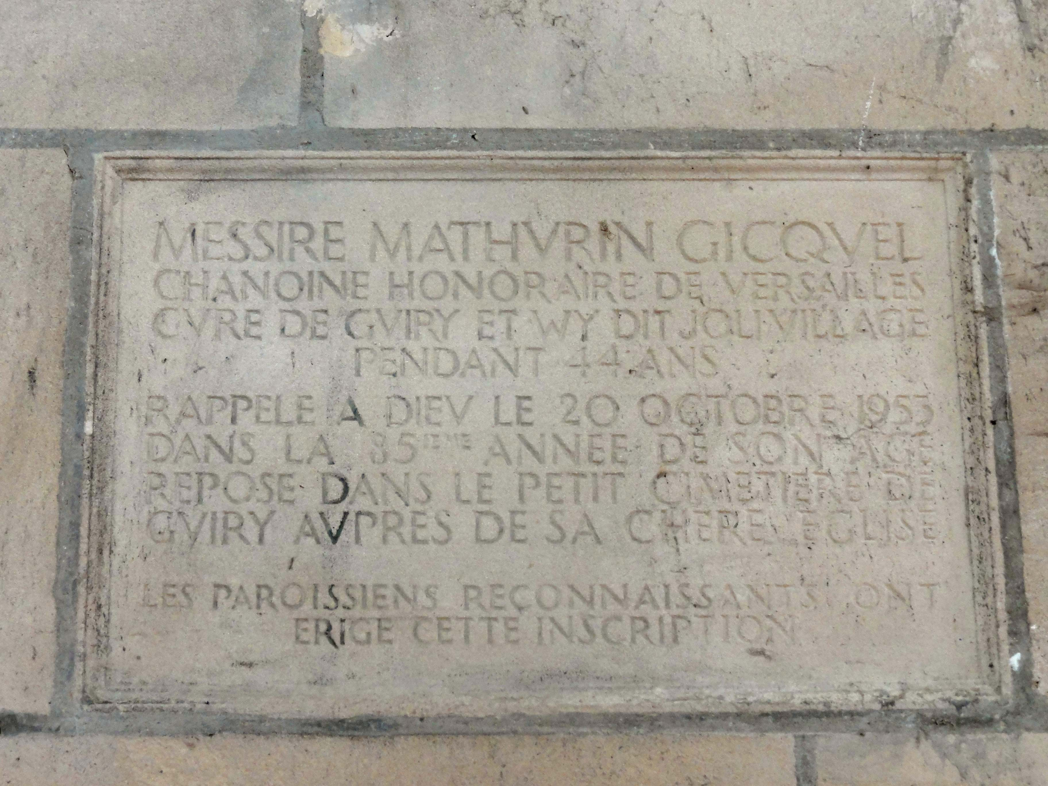 Nef, 2e travée, épitaphe pour l'abbé Mathurin Gicquel, curé de Guiry et Wy, mort le 20 oct. 1953.